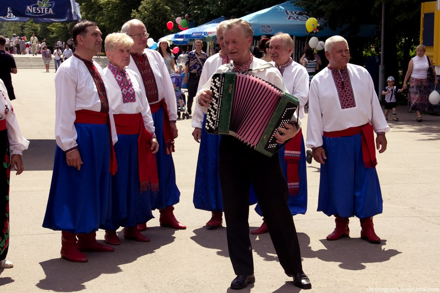 Выступление представителей украинской диаспоры на Дне города Тольятти 2012